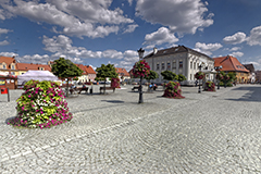 RynekMilicz2015